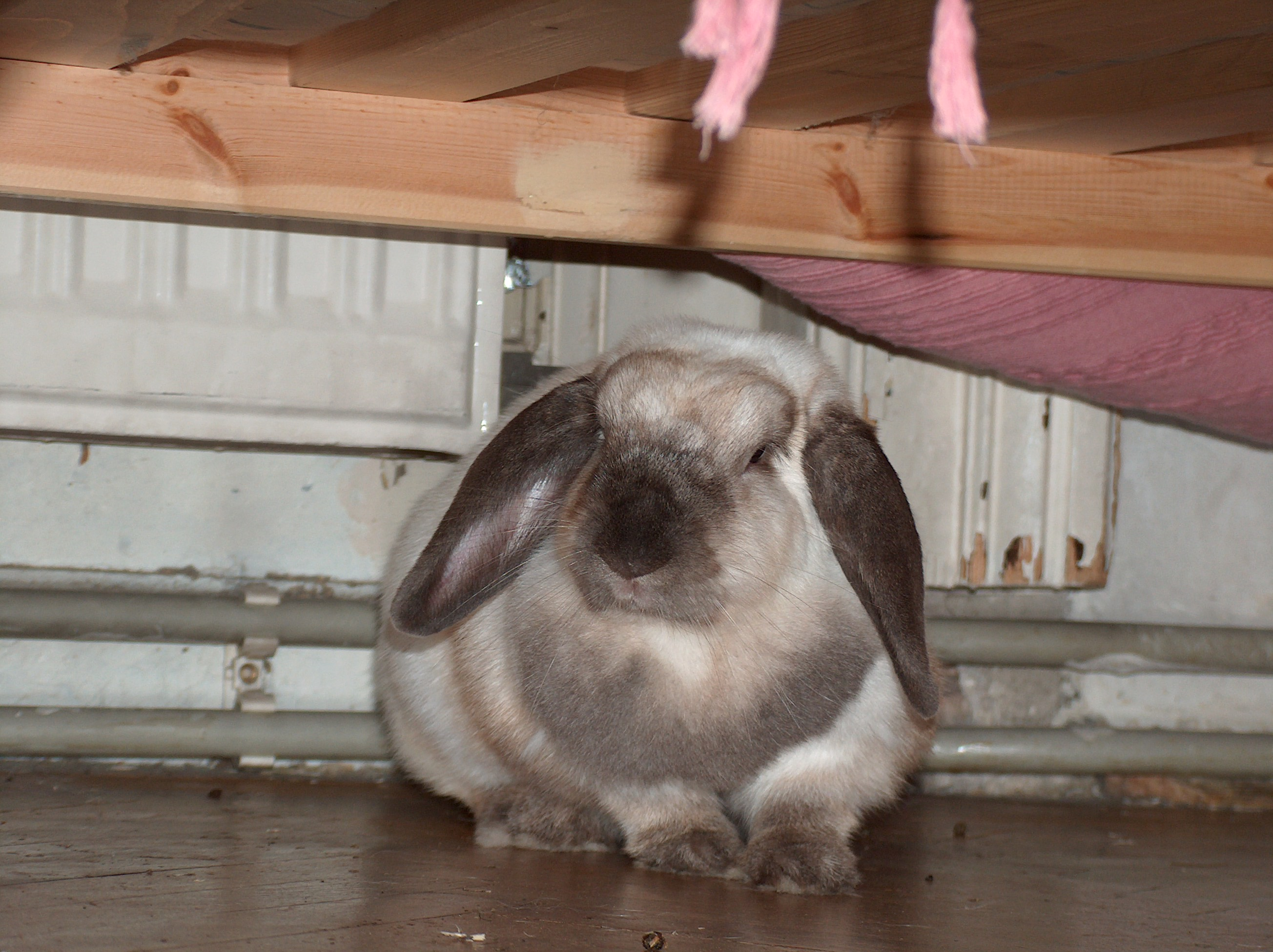 Description in de wikipedia Beschreibung: Widderkaninchen in Siamfarben, Oktober 2004 Quelle: selbst fotografiert Fotograf: Shanul